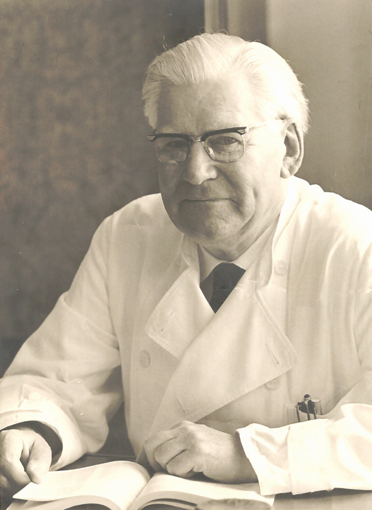 Prof. Dr. Max Schwarz, beim Lesen im Arbeitszimmer der Universitäts-HNO-Klinik Tübingen